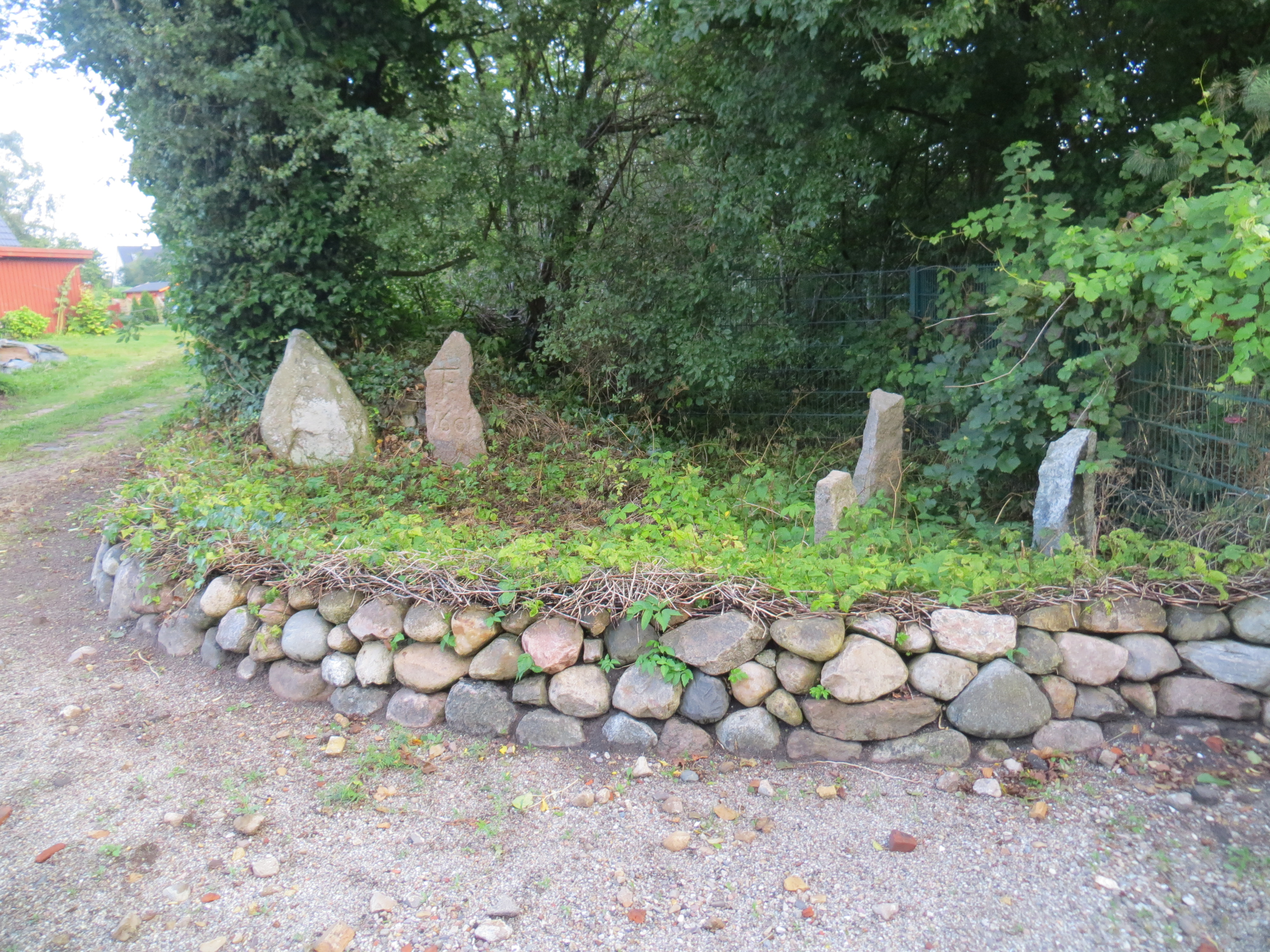 Sandemannsstein, Flensburger Grenzstein N33 und irgendwelche anderen Steine beim Flurtstück Oggesmose, Bild 02